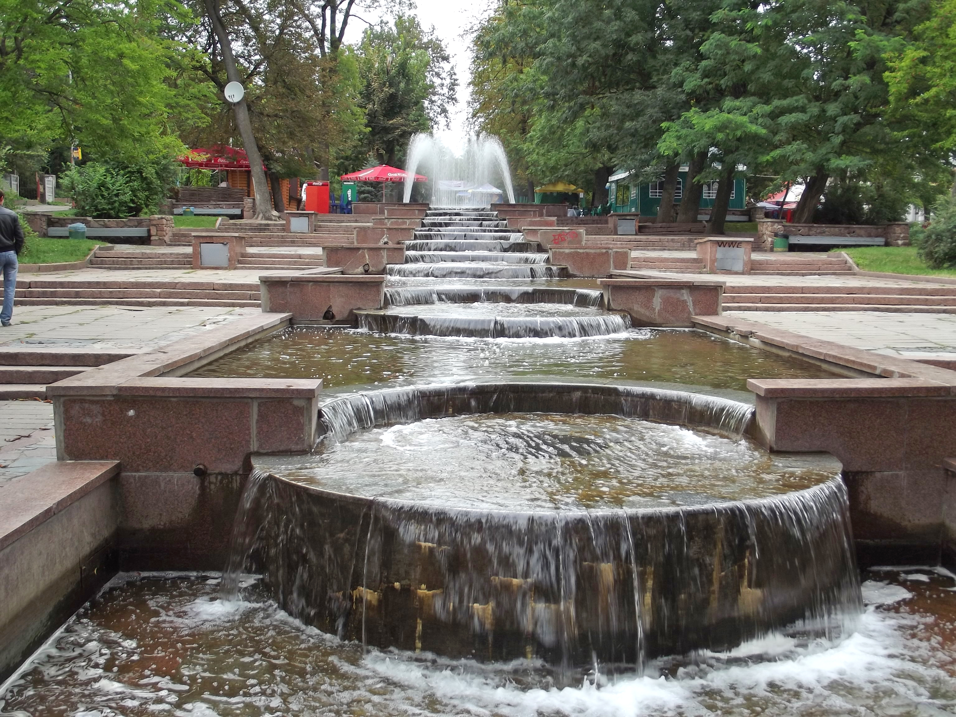 Парк Гагарина